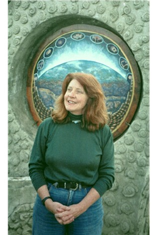 Diana Graham. Deze afbeelding is mijn eigen werk en ik stel haar onder GNU/FDL ter beschikking Jcwf